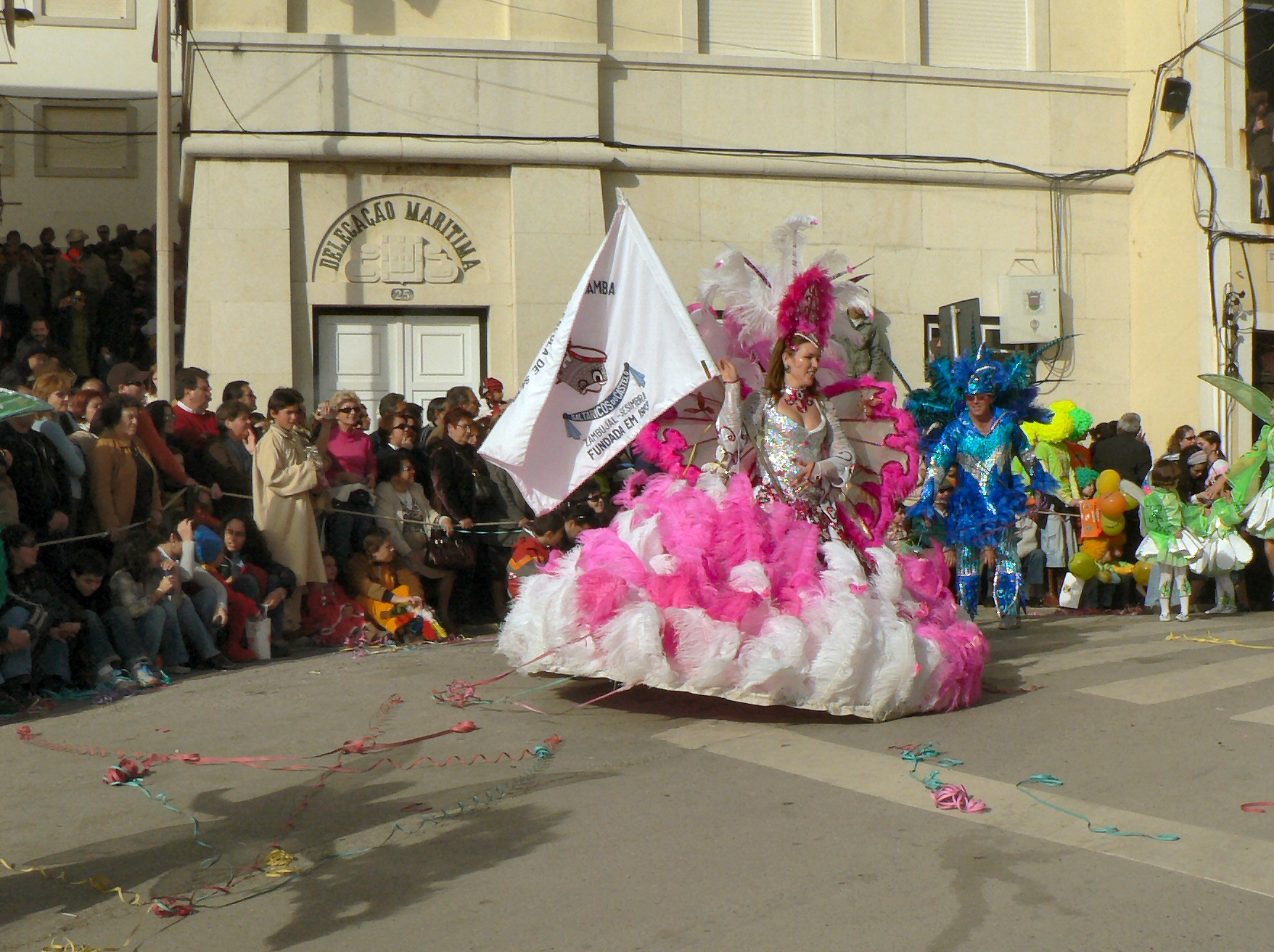 Desfile de Carnaval em Sesimbra 2007